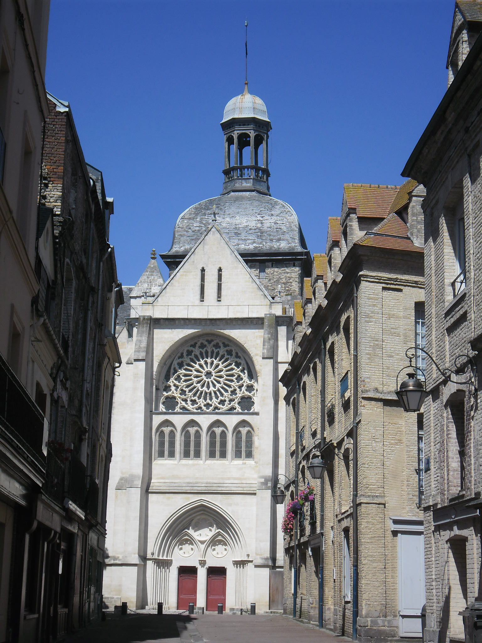 Église Saint-Jacques à Dieppe (France)